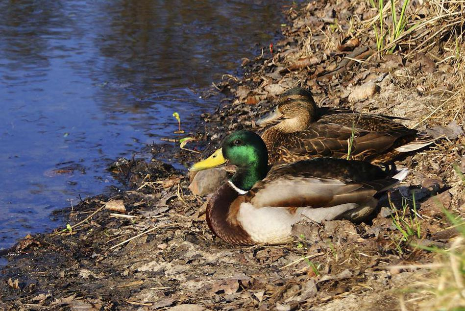 Samiec i samica kaczki kżyrzówki.